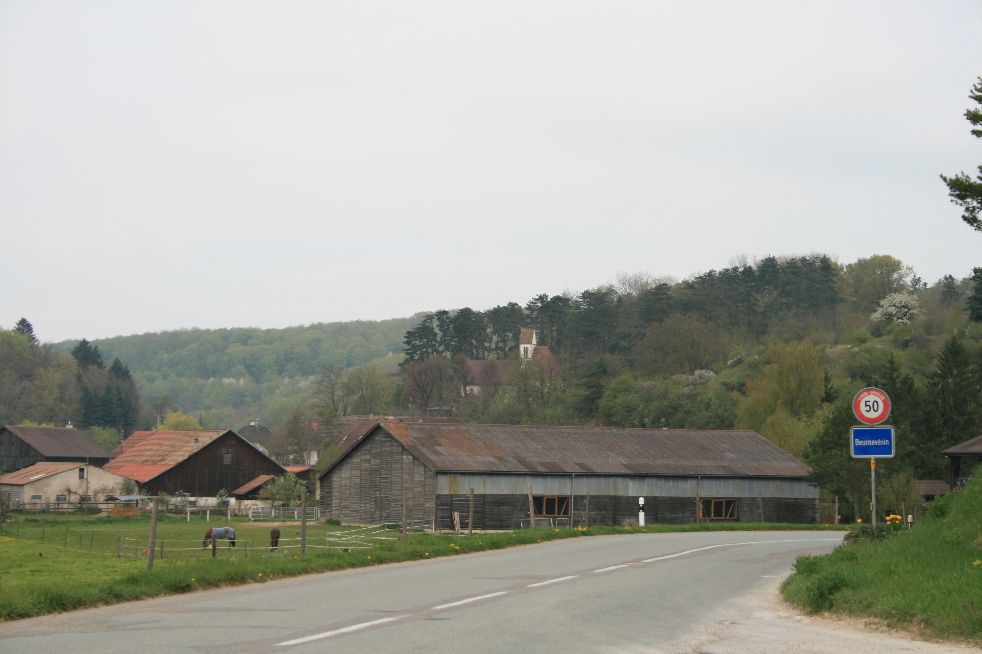 Beurnevésin, Kanton Jura, Schweiz